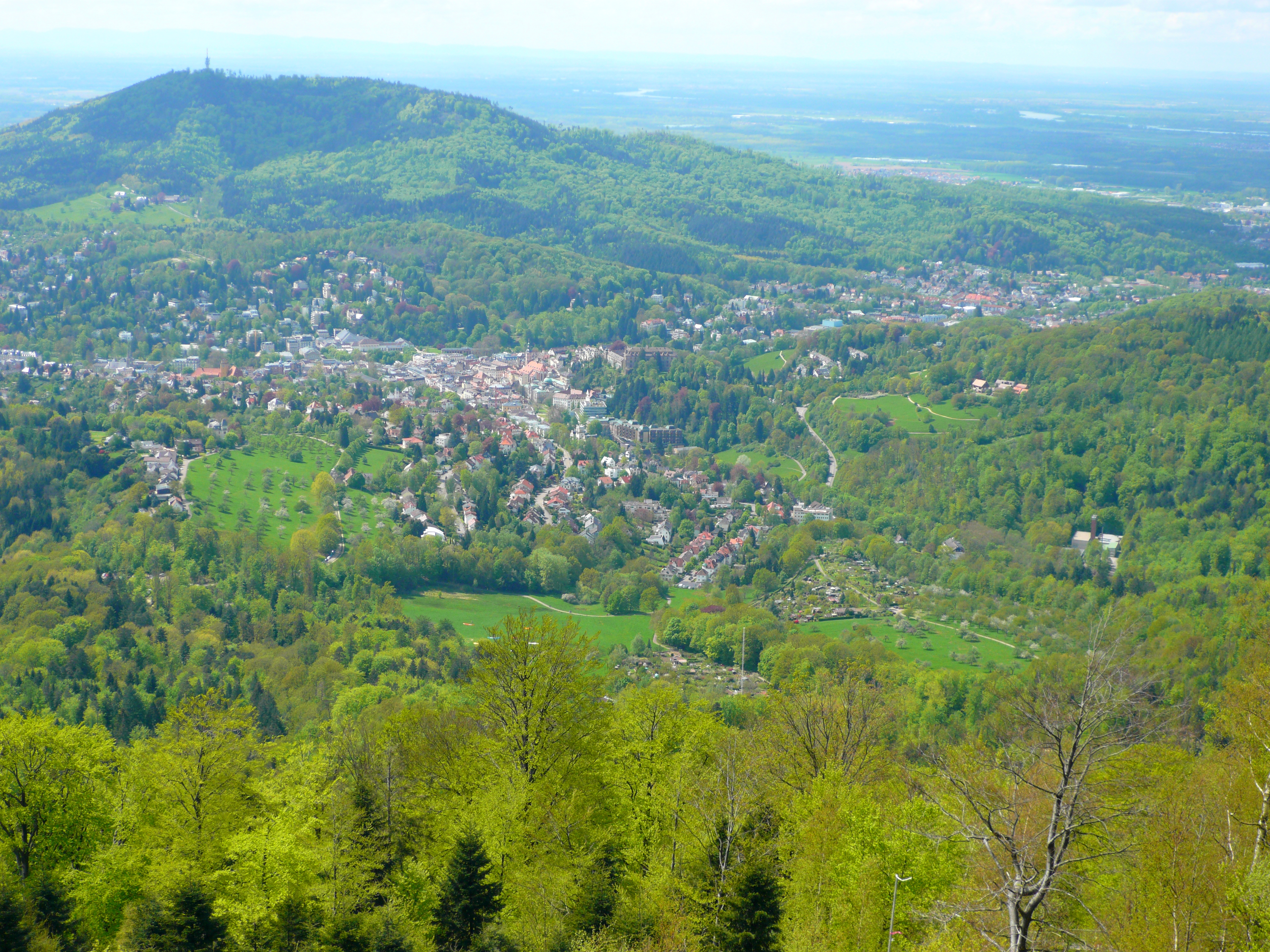 View on Baden Baden from Merkur